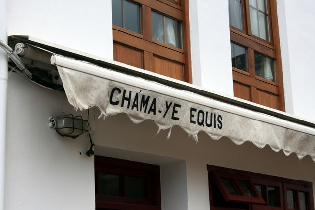 Semeya fecha na uiquipedia gallega d'un bar en Tapia (Asturies)